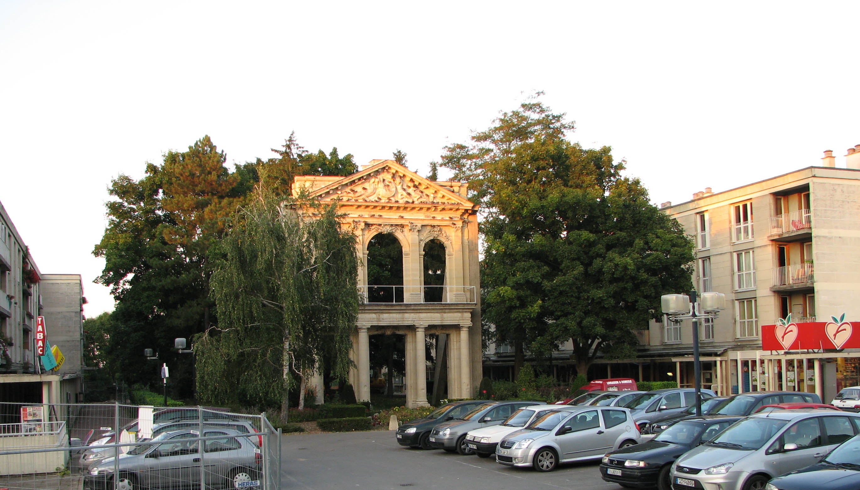 Fronton de l'ancien château de Beauregard à La Celle-Saint-Cloud dans les Yvelines